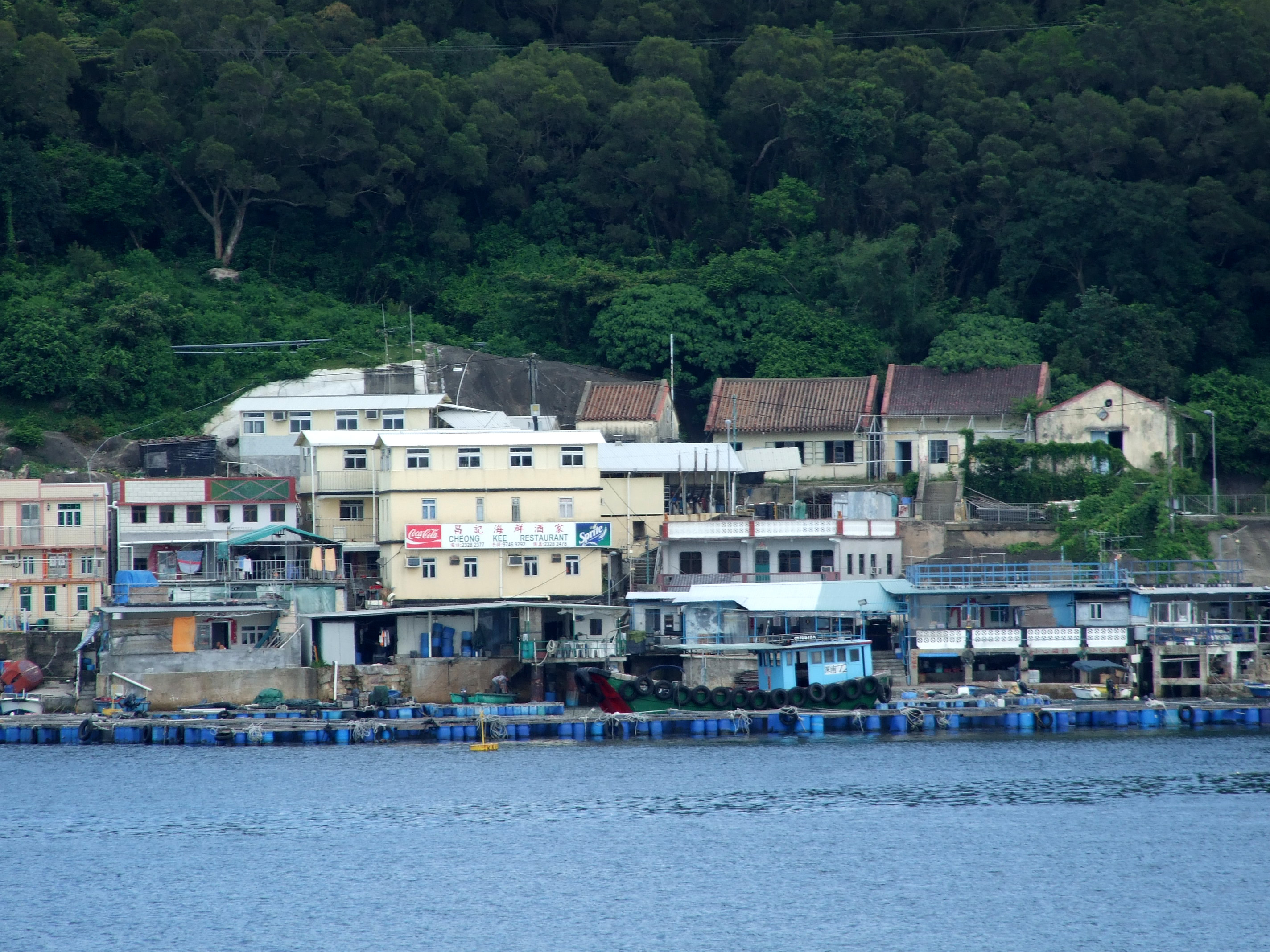 中文（香港）: 較流灣魚類養殖區